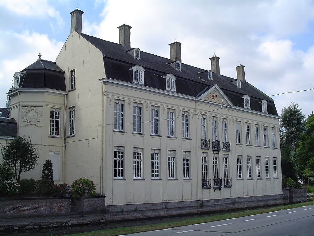 Front View of the Castle Ter Beken in Mariakerke (Gent)